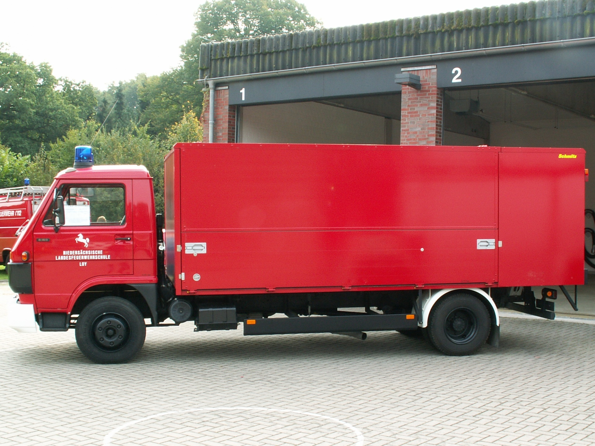 Gerätewagen Gefahrgut nach Technischer Weisung Nr. 12 Niedersachsen (GW-G) der Niedersächsischen Landesfeuerwehrschule Loy, MAN 8.150, Baujahr 1992.